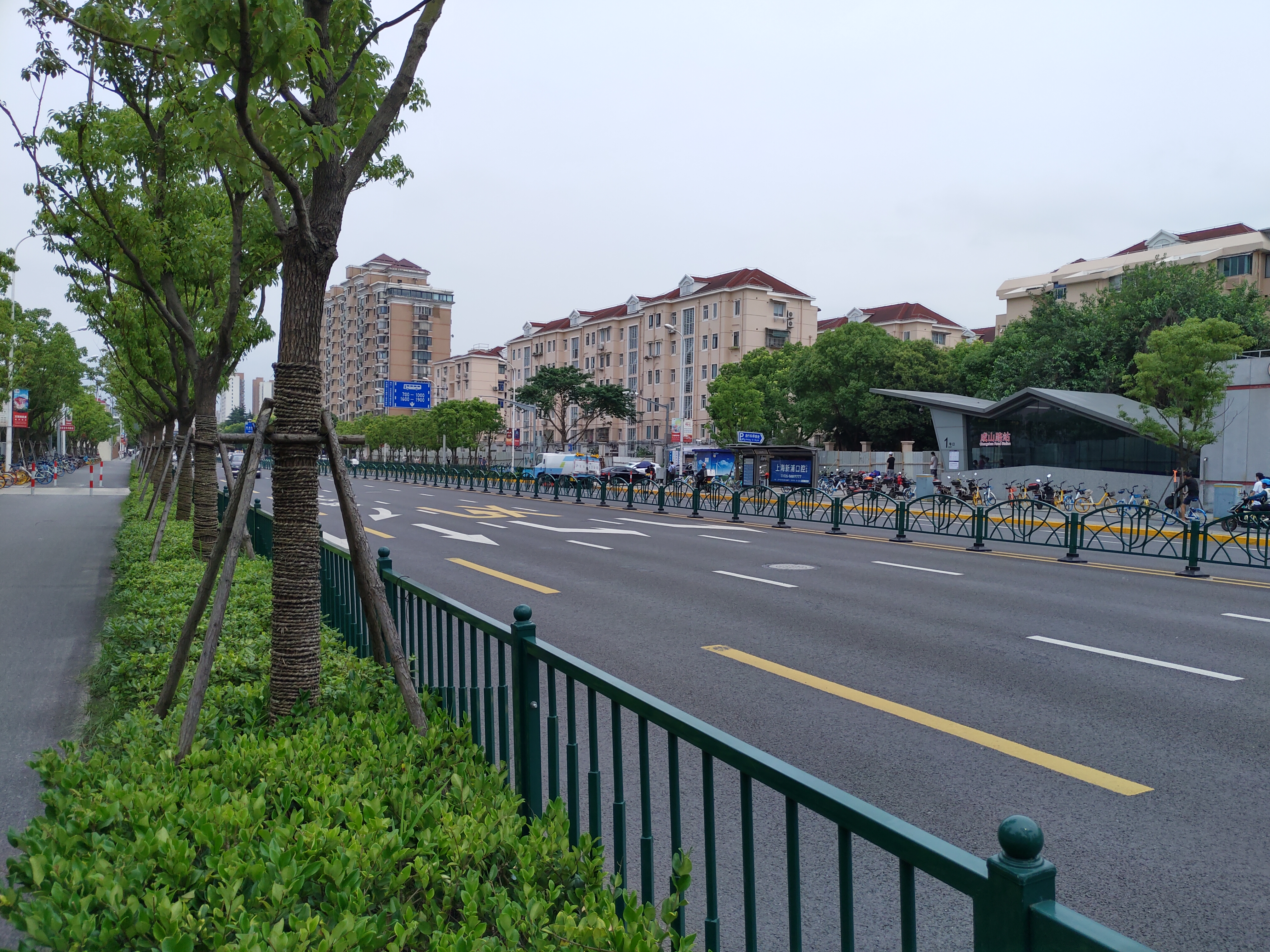 成山路街景，上海，2020